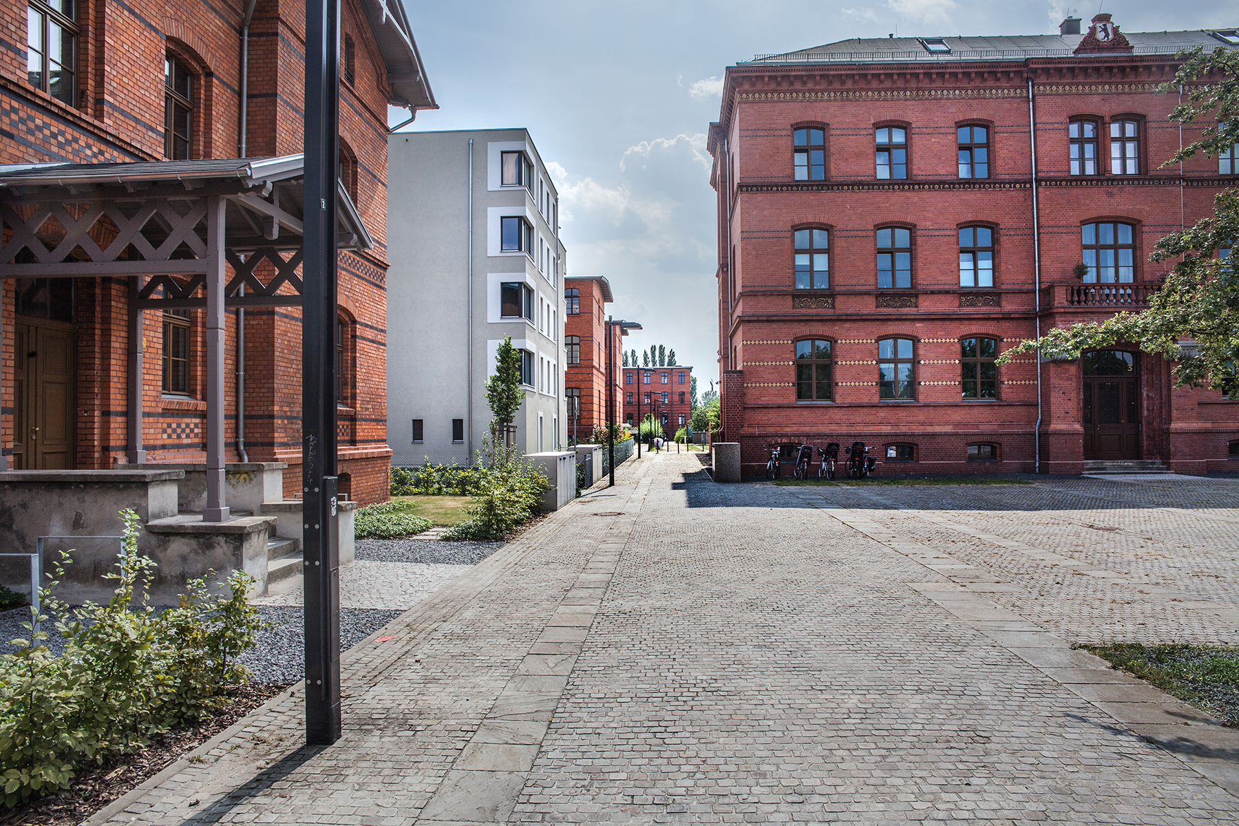 Berlin, Rummelsburg